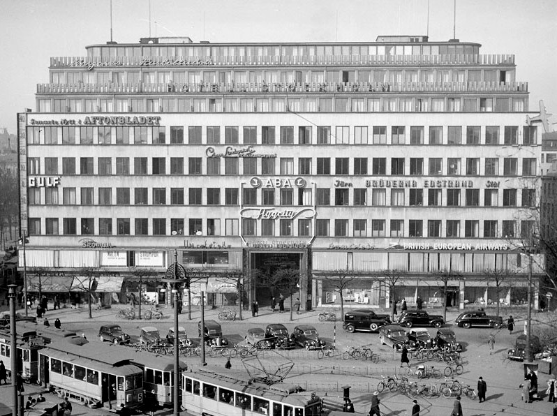 Norrmalmstorg med Citypalatset i fonden (bilden är beskuren)